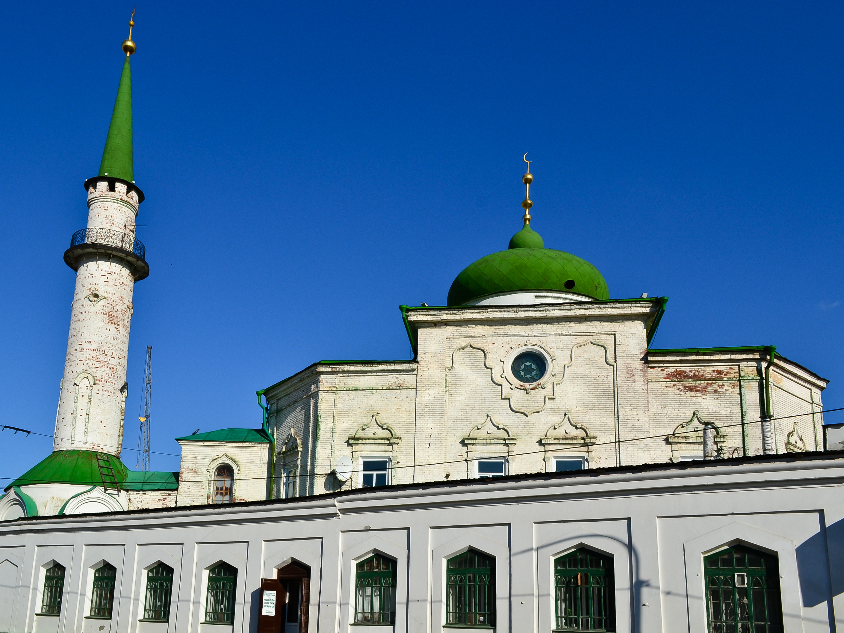 Центральная соборная мечеть Старо-Татарской слободы Казани